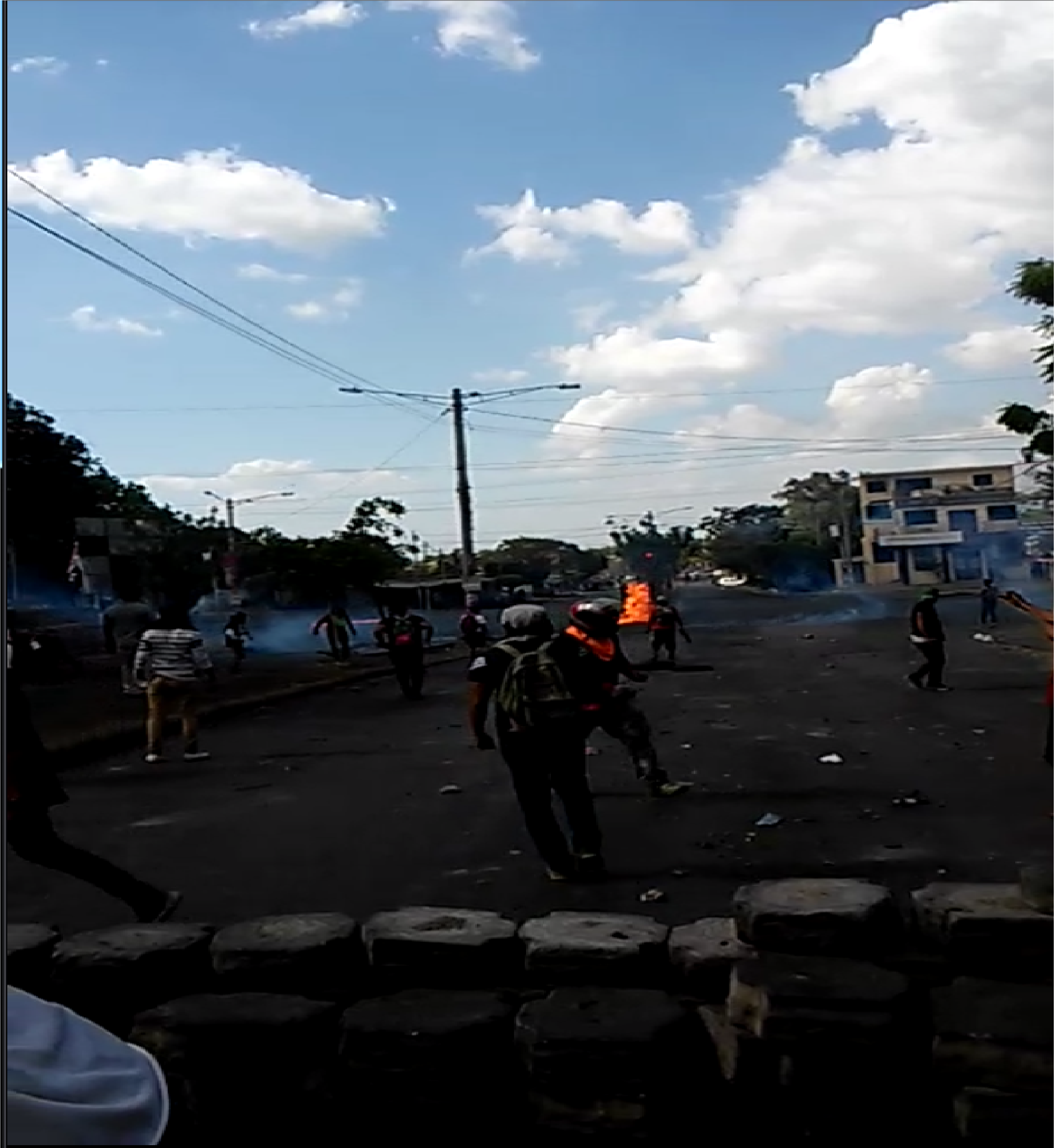 Enfrentamientos entre la Policia Nacional de Nicaragua y manifestantes en las inmediaciones de la Universidad Politécnica en Managua.